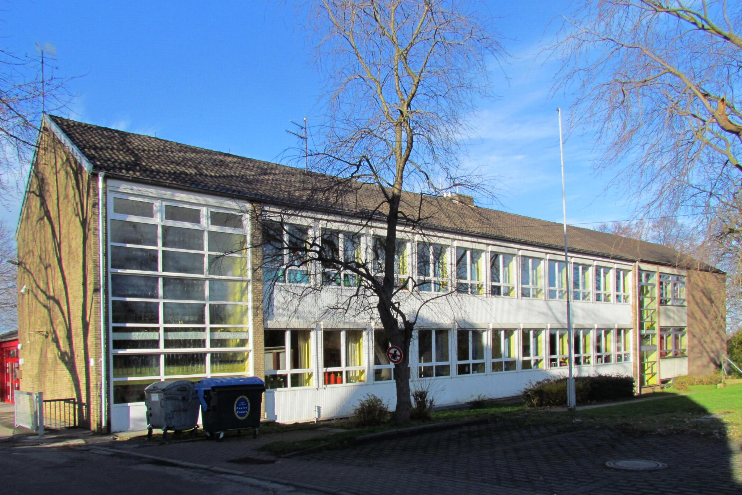 Schulgebäude in Würm